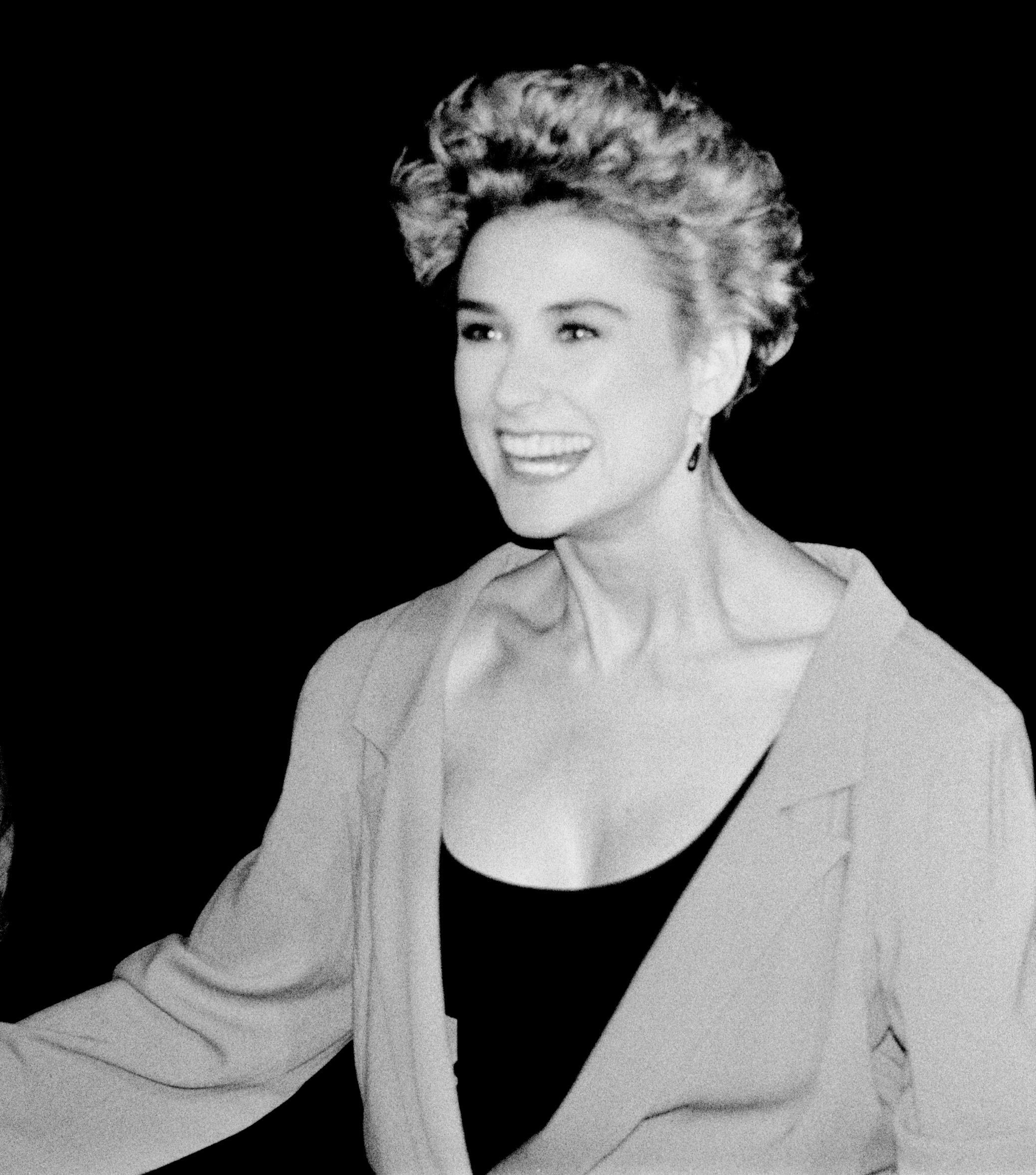 L'actrice américaine Demi Moore au Festival du cinéma américain de Deauville (Normandie, France) en septembre 1990.